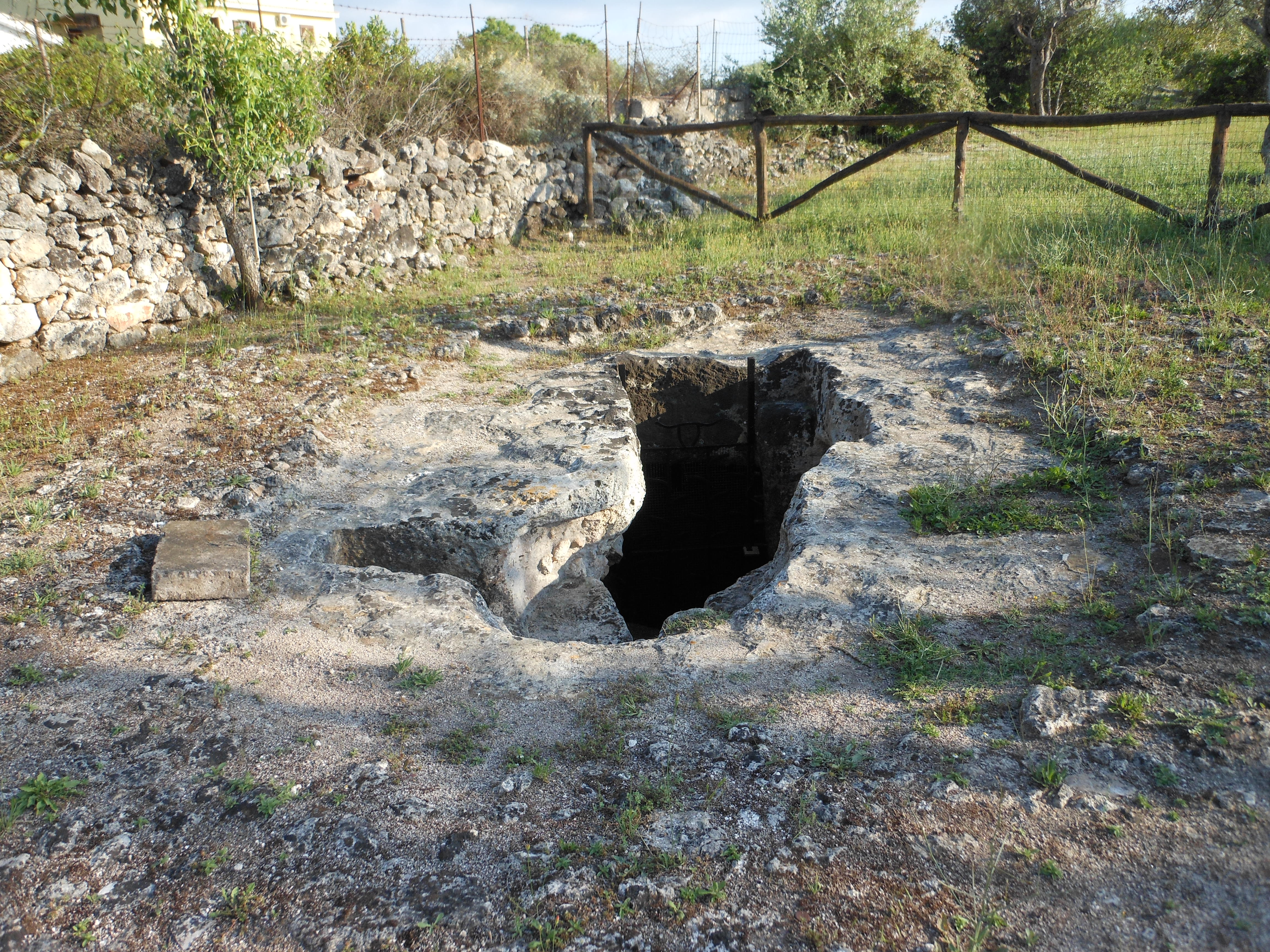 Sassari - Necropoli di Montalè